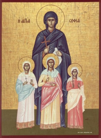 Свв. мцц. Вера, Надежда, Любовь и София (Византийская икона)